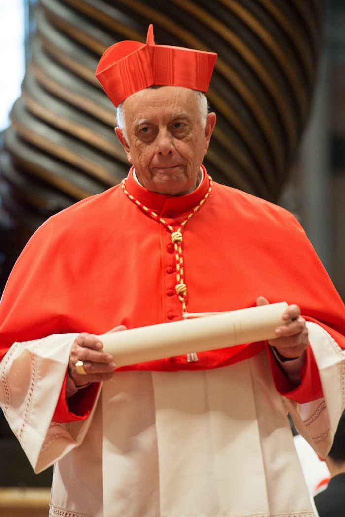 Cardenal Alberto Súarez Inda